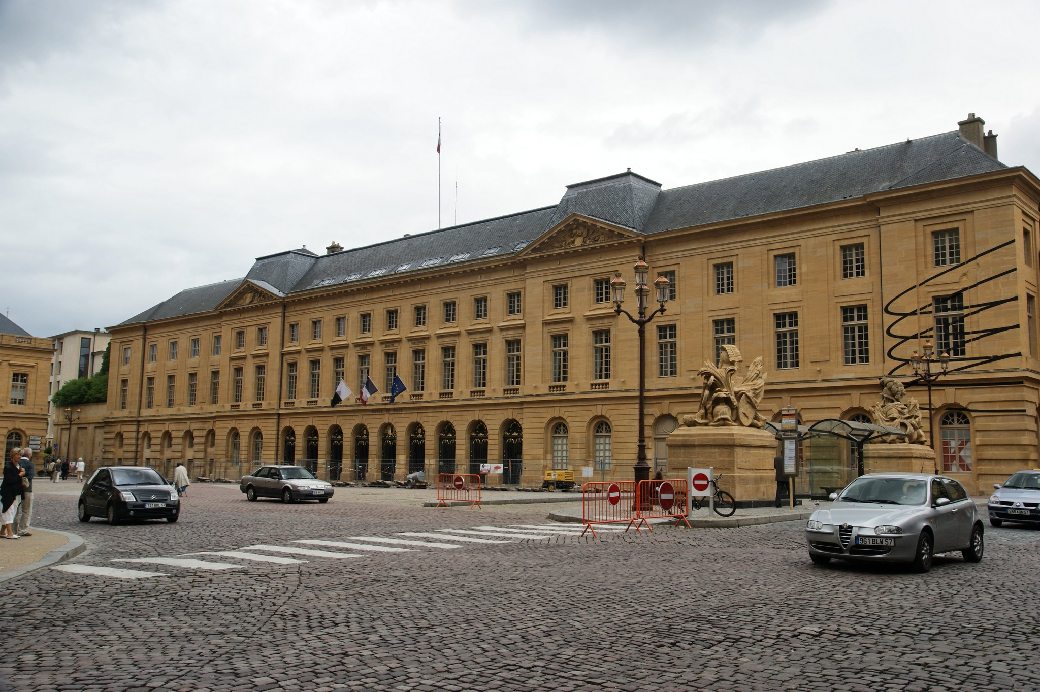 Ce magnifique bâtiment de style néoclassique, avec une façade de 92 mètres , construit de 1769 à 1771 par l'architecte BLONDEL , abrite la Mairie de METZ.